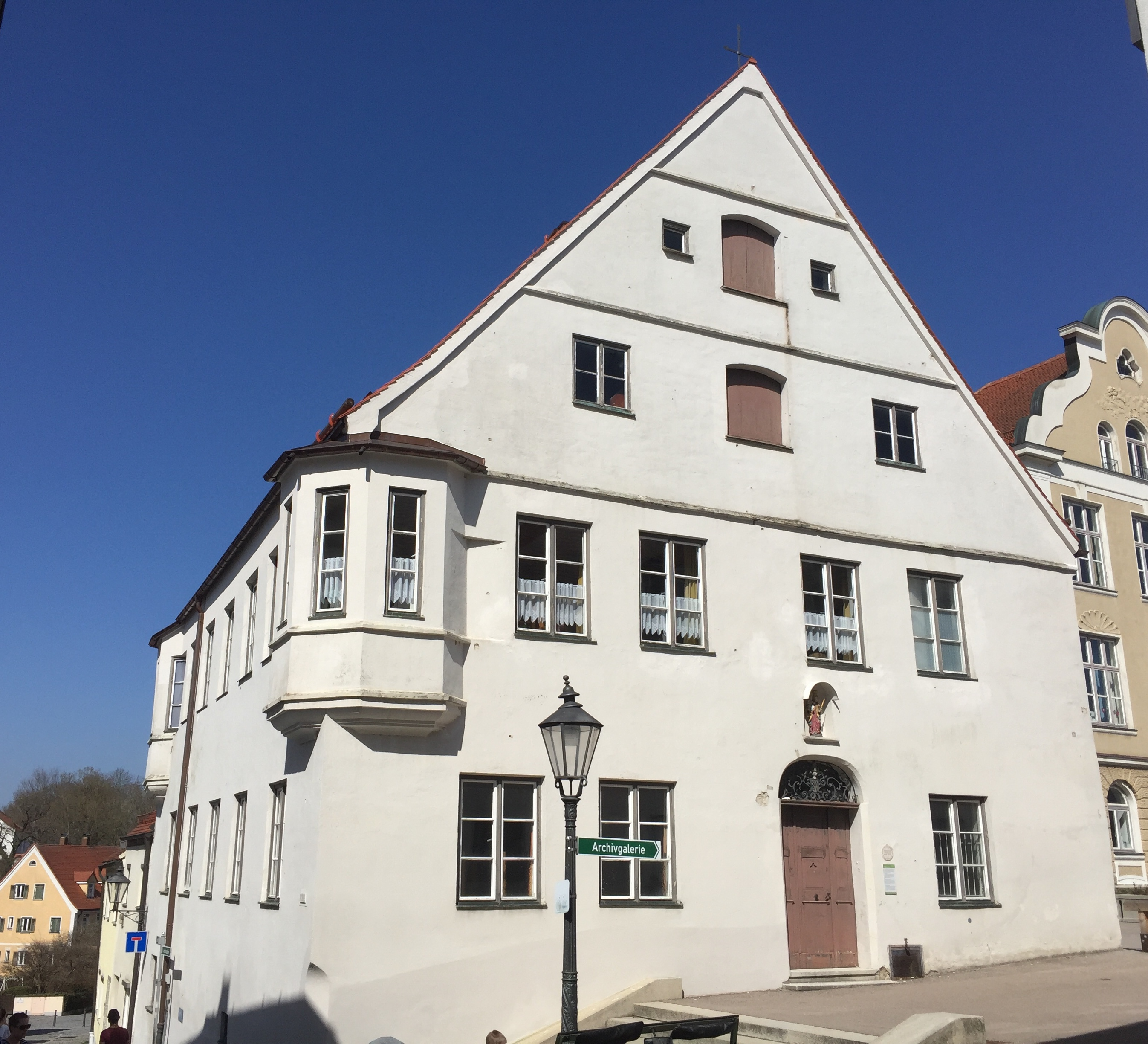 Baudenkmal Nr. D-7-71-130-19